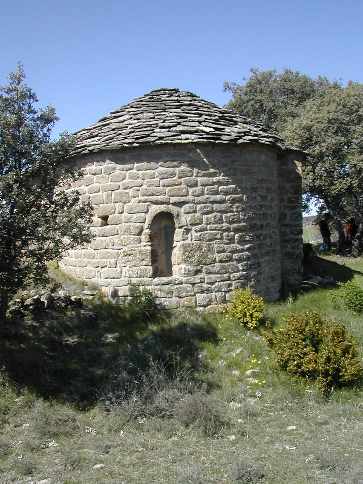 Absis de l'església de Sant Salvador de la Serra, al municipi de Sant Esteve de la Sarga (Pallars Jussà).